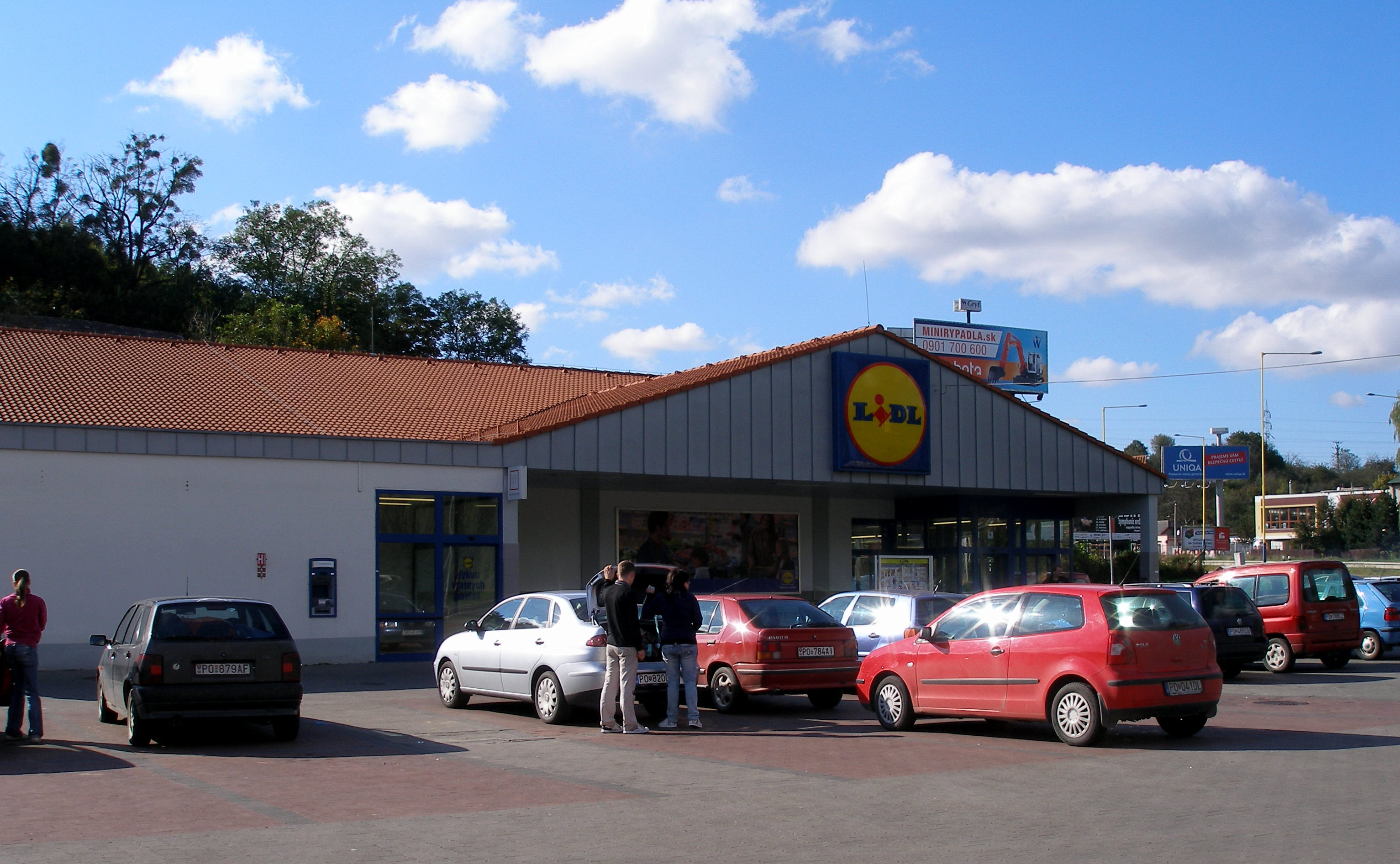 Obchodný dom Lidl na Sídlisku II v Prešove.